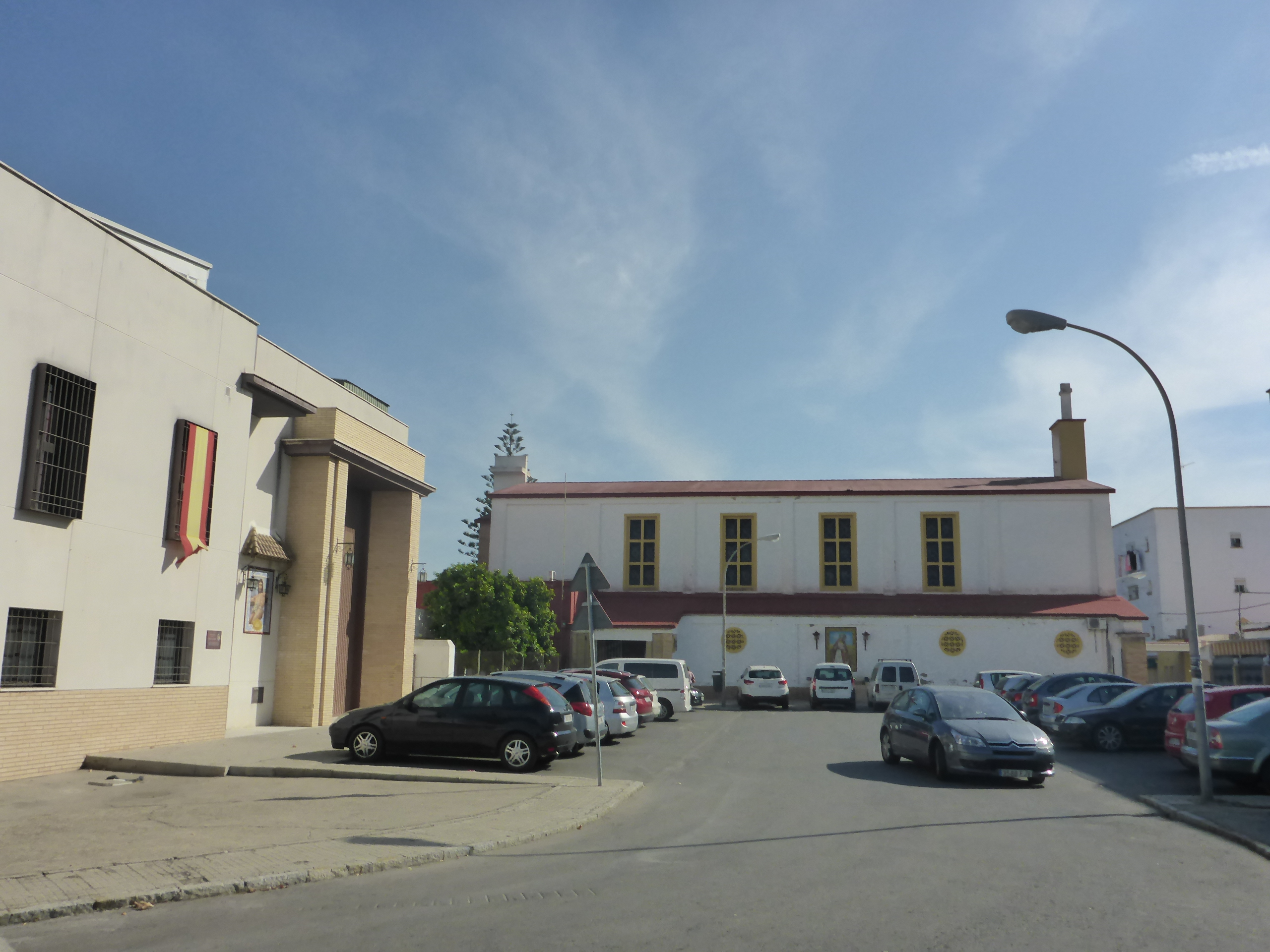 Parroquia de Nuestra Señora de Las Viñas de Jerez de la Frontera